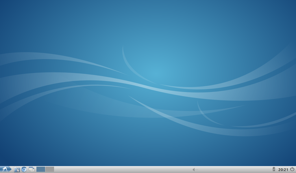 Lubuntu 12.04 Desktop Theme / Bildschirm von Lubuntu 12.04